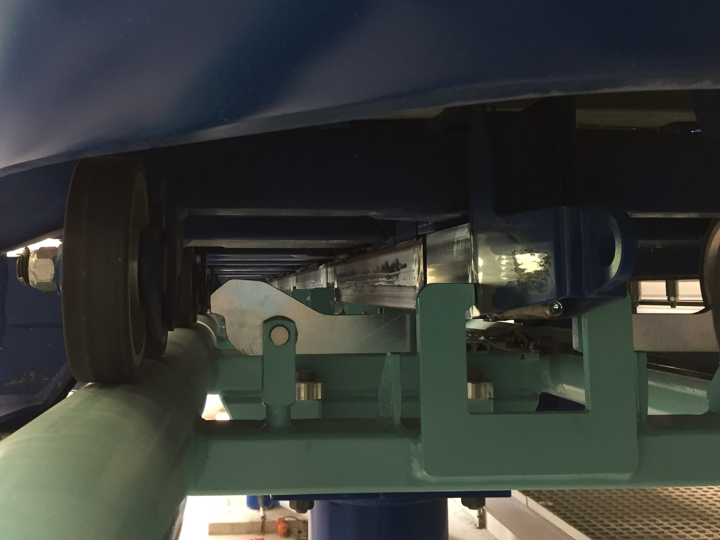 File:Dessous train Pégase Express.jpg recadré sur la plaque de friction.